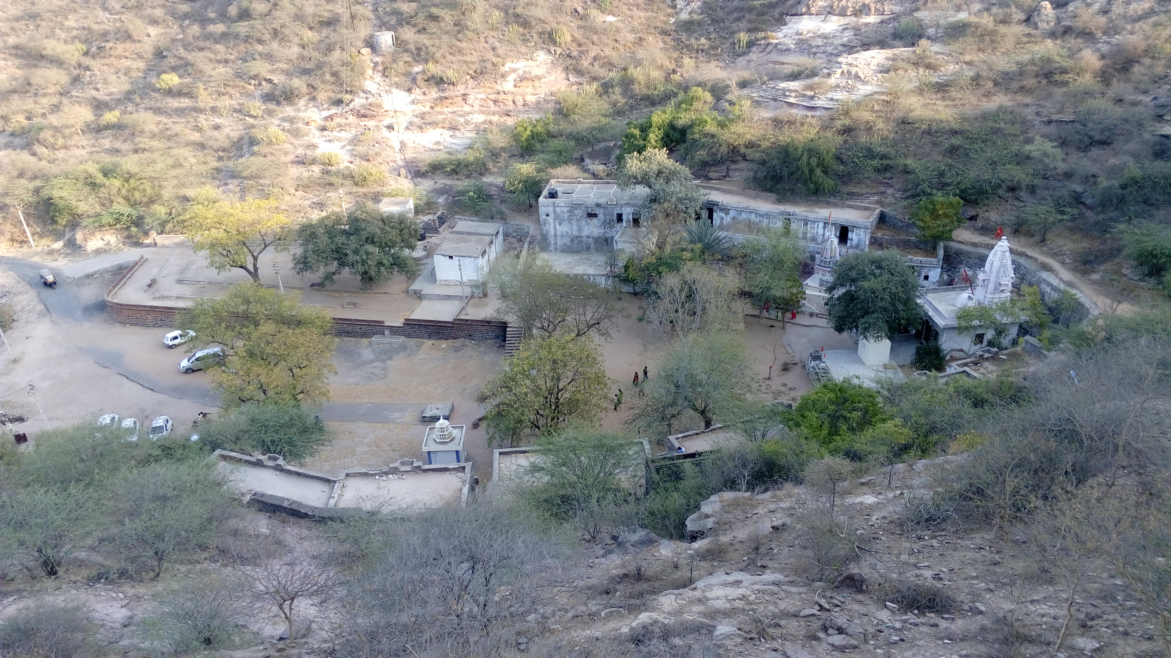 Campus of Tapakeshwari Temple near Bhuj Kutch Gujarat India